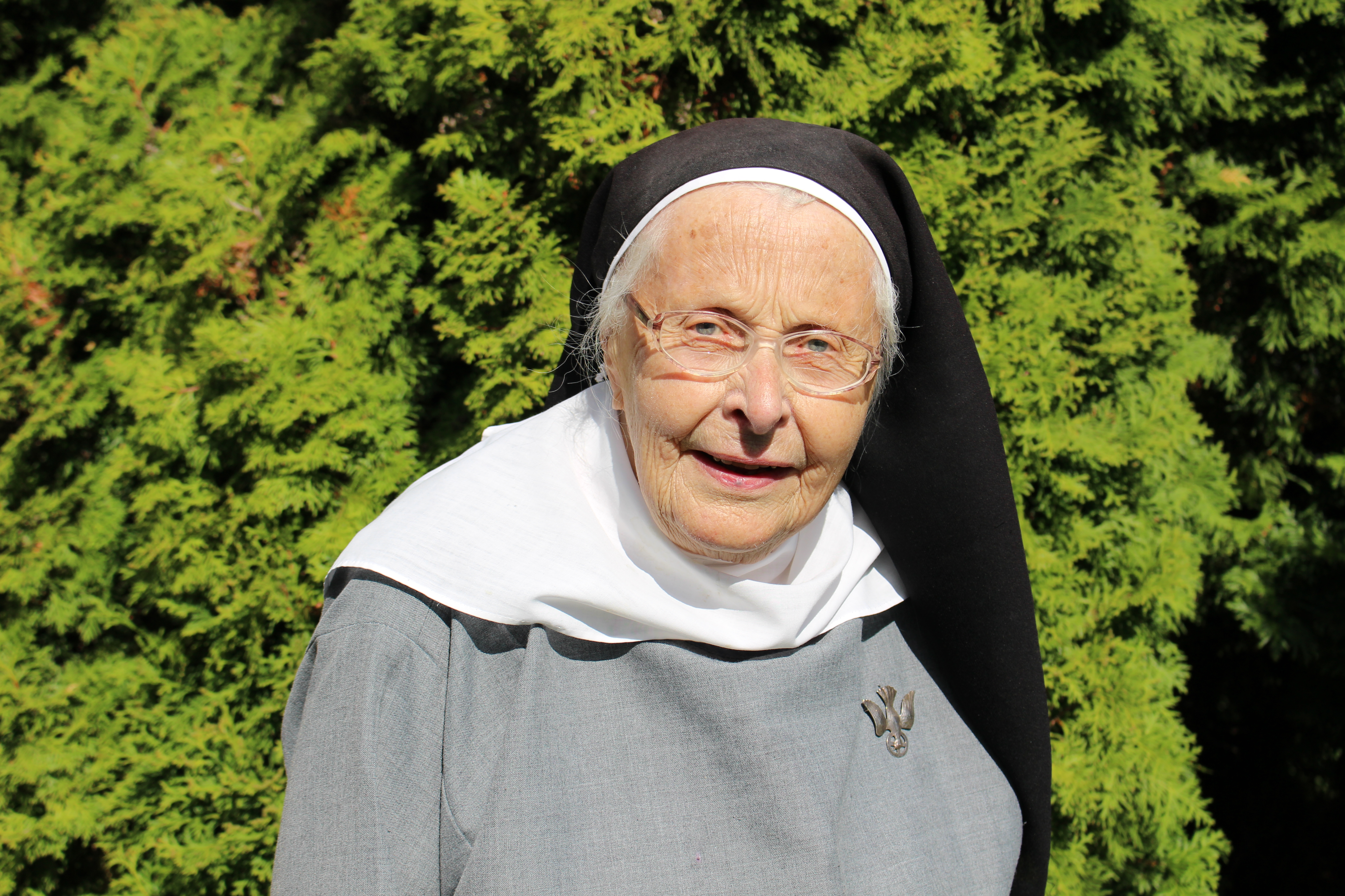 Syster Marianne Nordström, Alsike kloster. Bilden är tagen utanför vapenhuset vid Alsike kyrka.